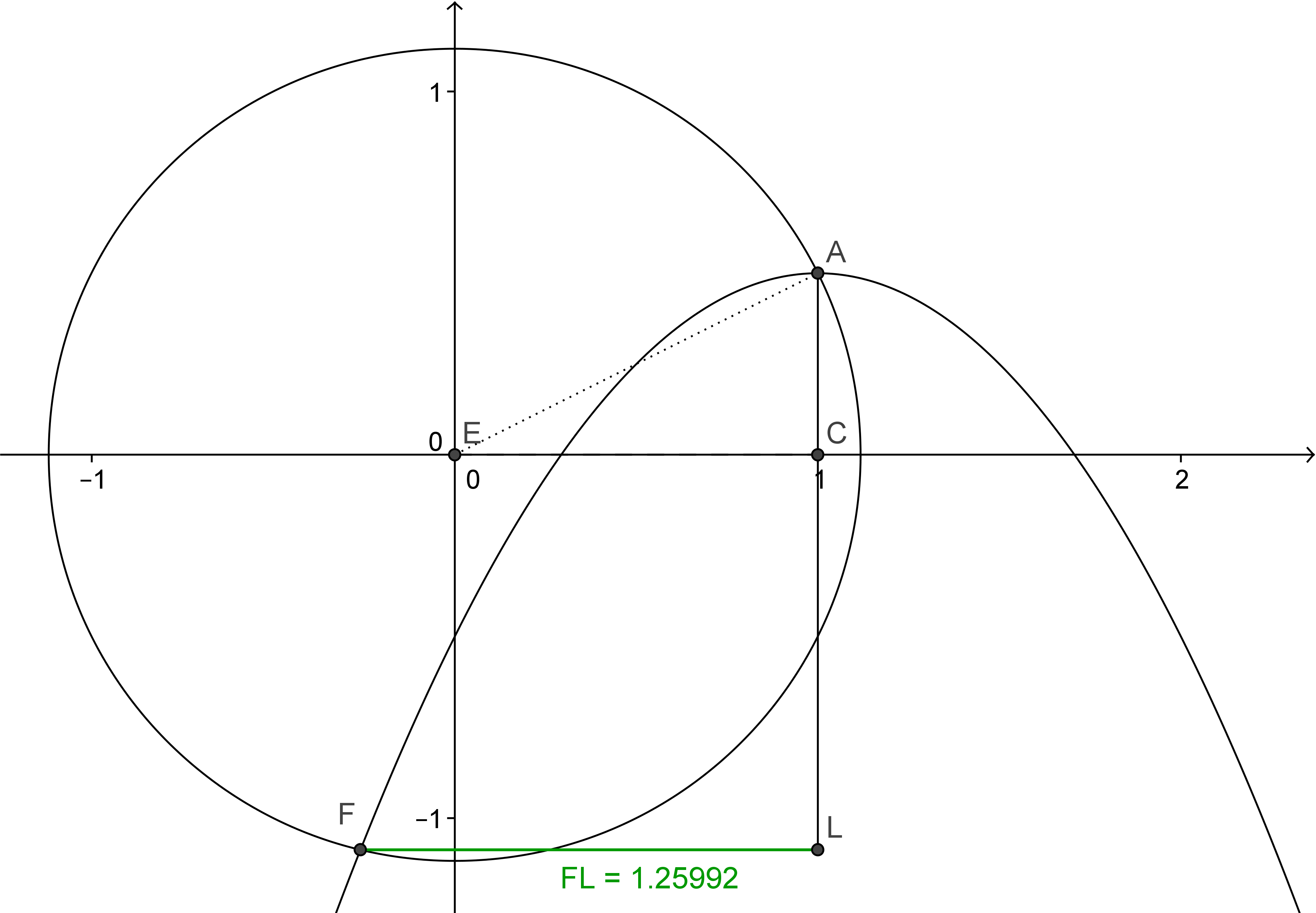 Duplicació del cub